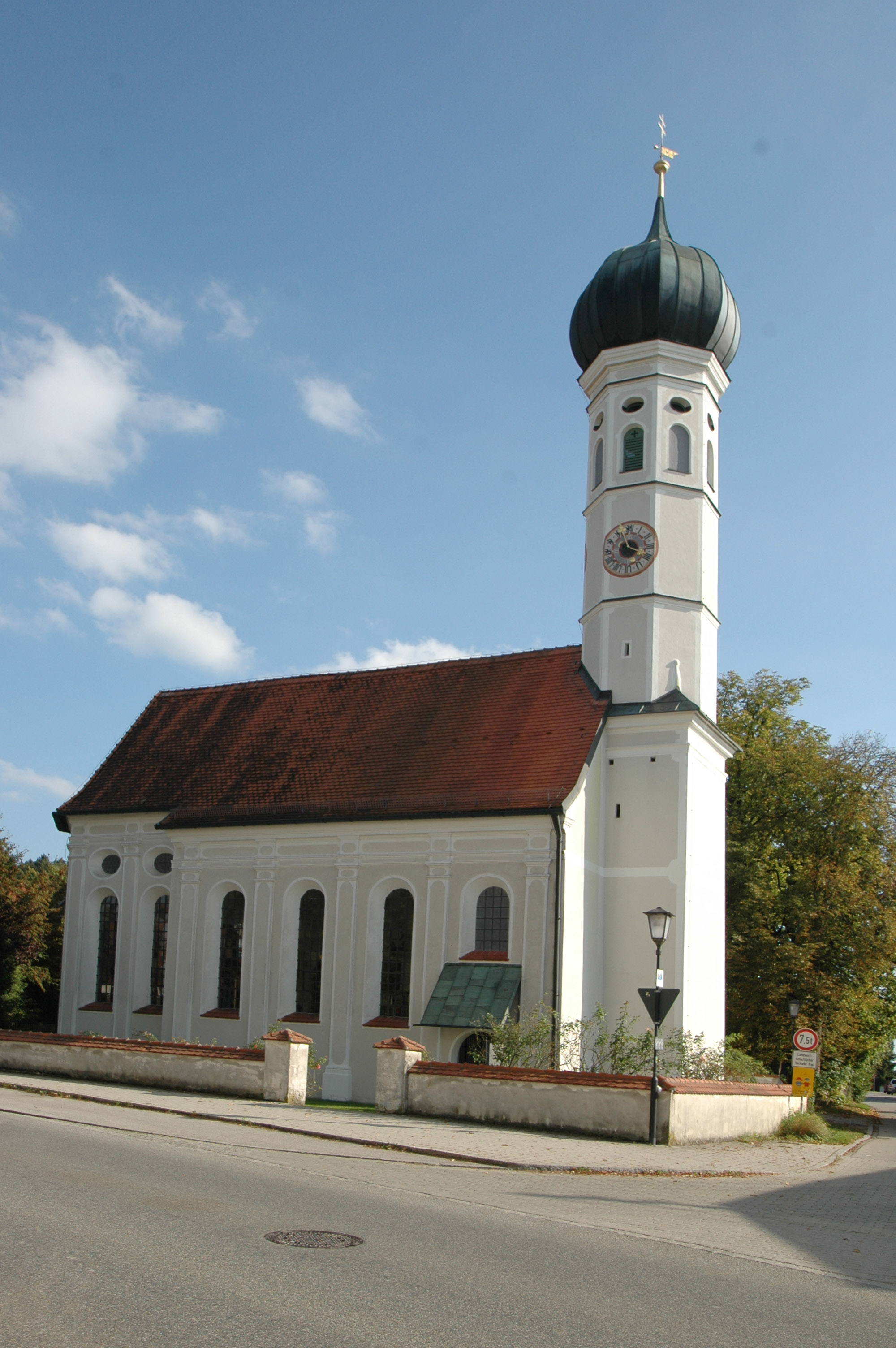 St. Nikolaus in Peiß (Aying).Katholische Filialkirche, barocker Saalbau mit Pilastergliederung, eingezogenem Polygonalchor, Westturm mit Zwiebelhaube und seitlich angefügter Sakristei. Erbaut von Johann Mayr von Hausstatt, 1696 bis 1699. Friedhofsmauer massiv.